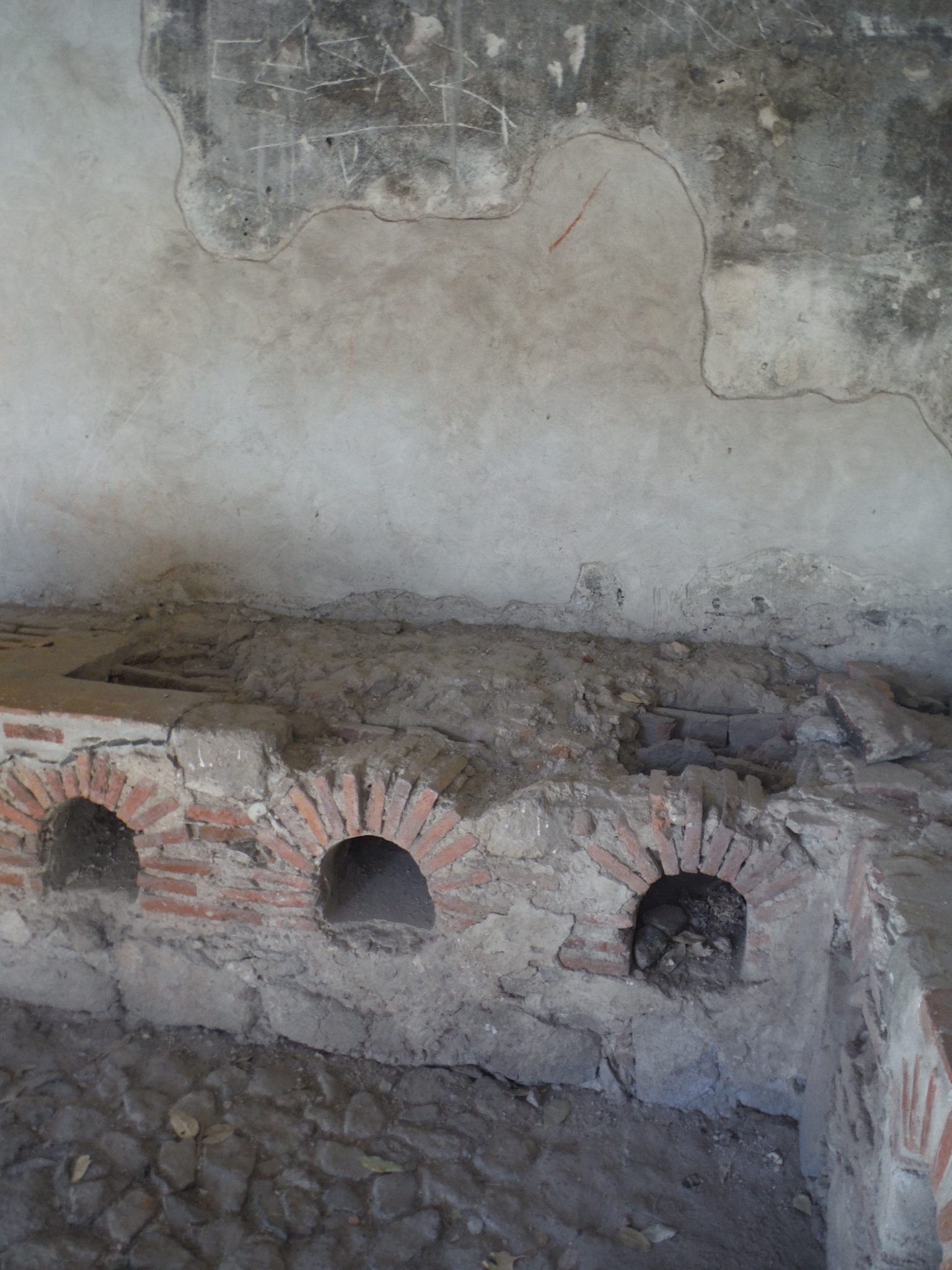 Restos de la cocina ubicada en el Fuerte de la Isla de Mezcala.